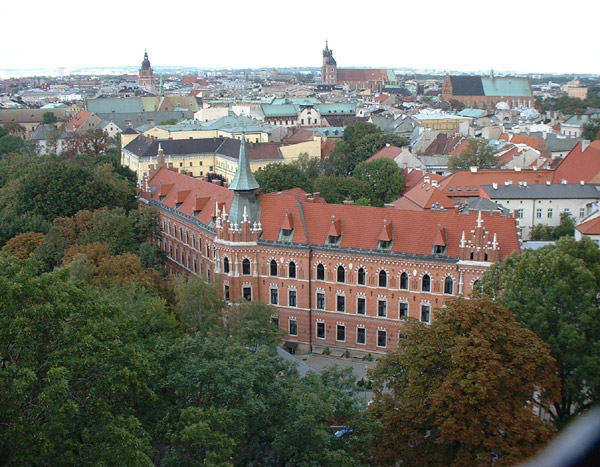 Altstadt Krakau (eigene Aufnahme, 2003 - GFDL)